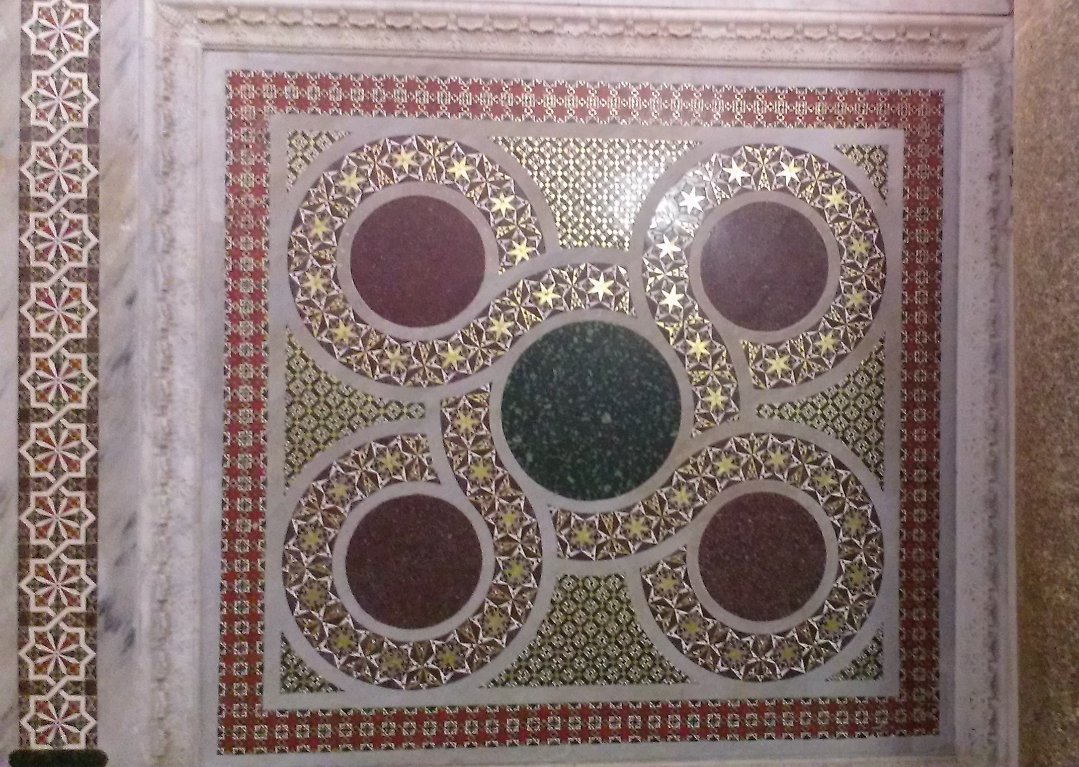 Exemple de panneau de mosaïque de marbre en Opus sectile décorant les parties basses des murs latéraux de la Chapelle Palatine